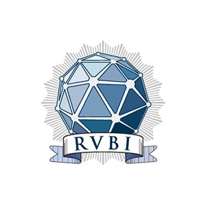 Logo da Rede Virtual de Bibliotecas (RVBI)